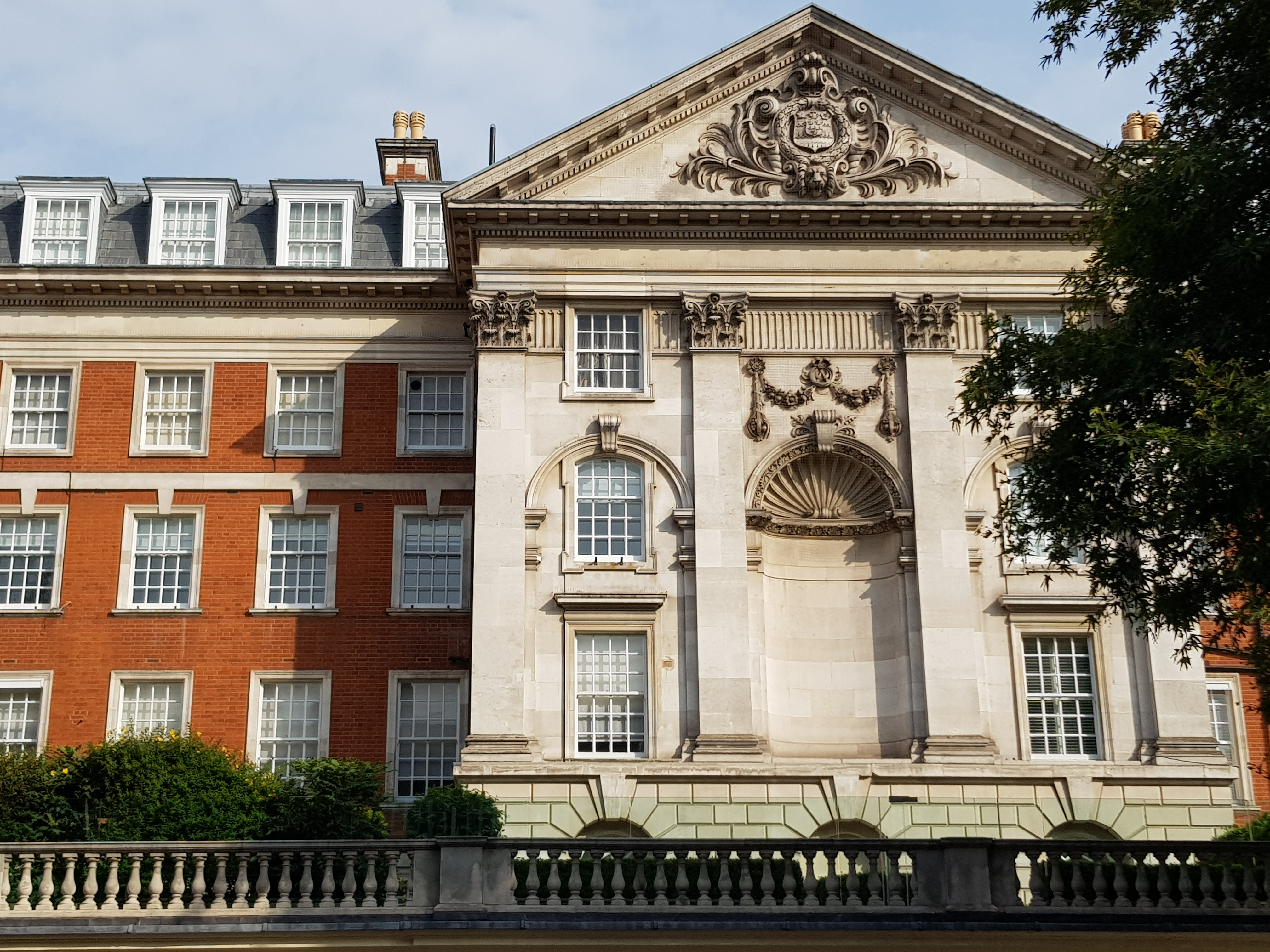 Façade surplombant Kensington High Street, Londres.